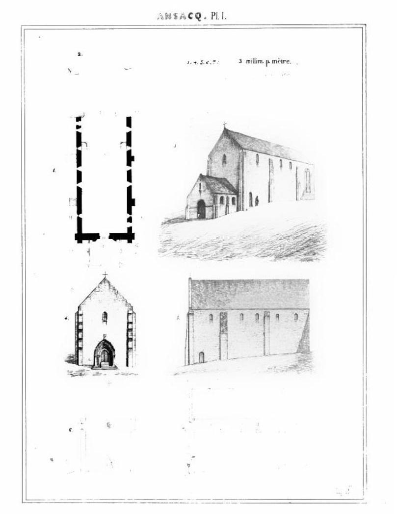 Croquis d'architecture relevés sur place par Eugène Woillez.